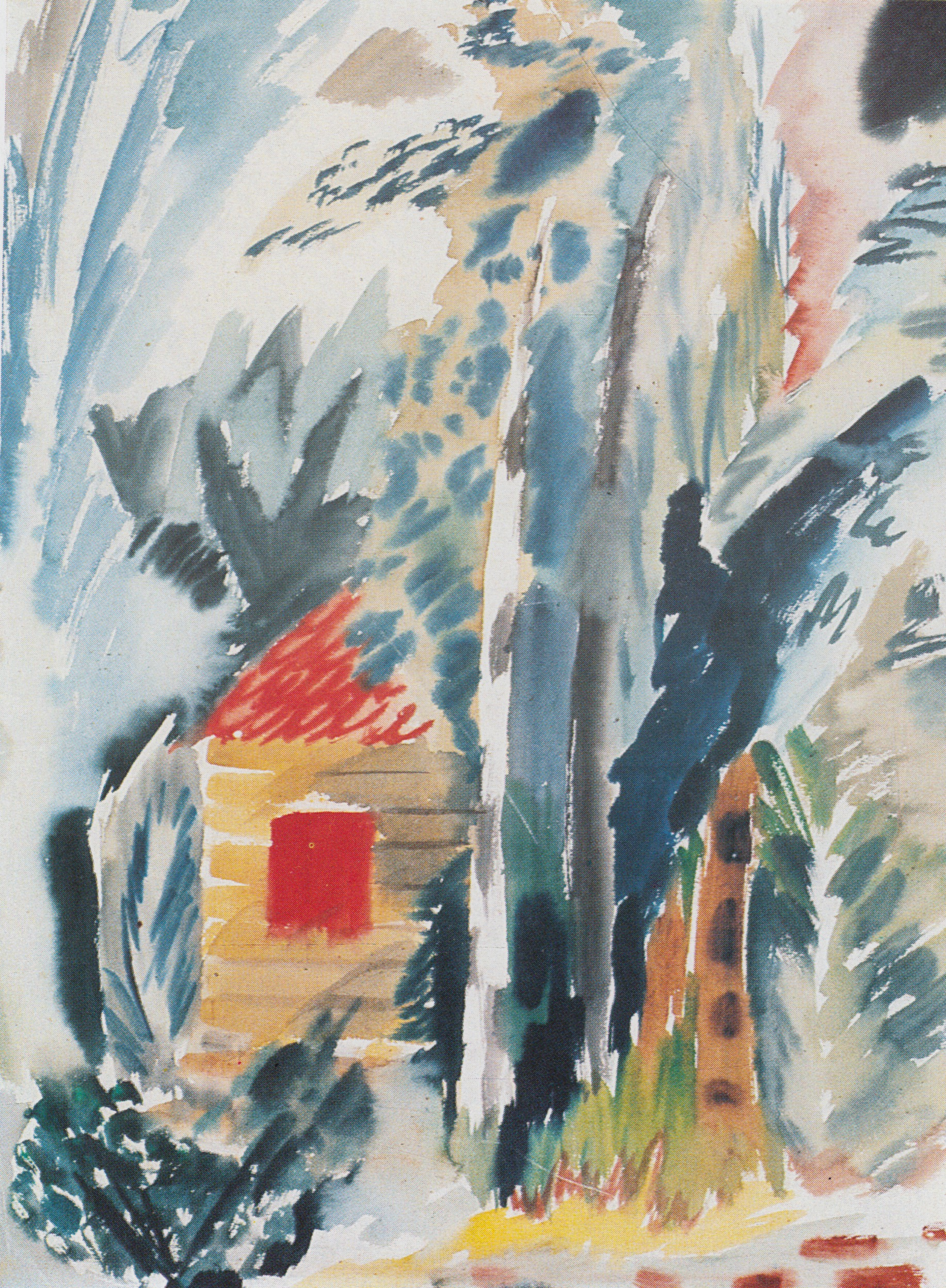 Klaus-Andreas Moering, Haus im Wald, Aquarell 1941, Privatbesitz